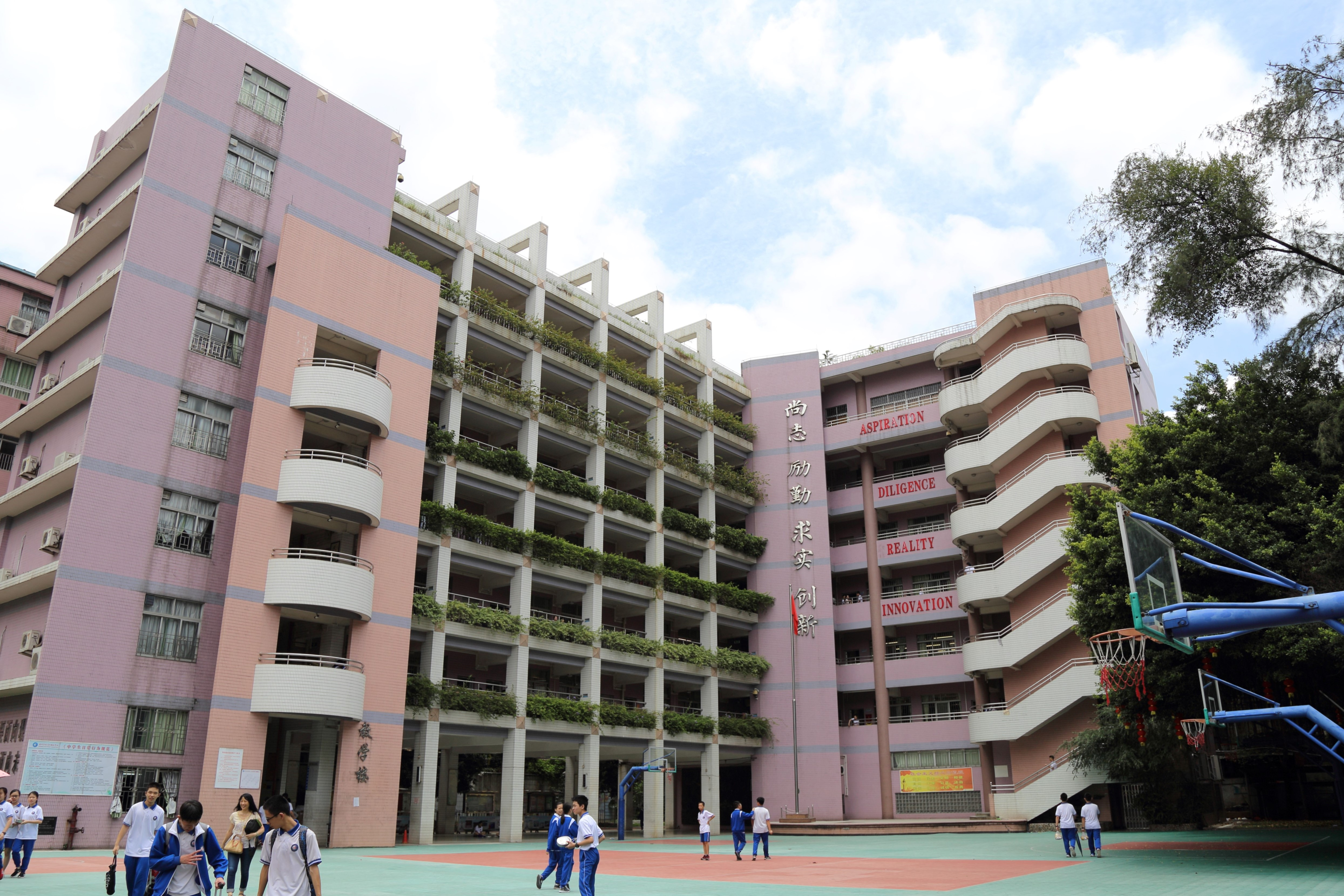 中文（香港）: 廣州市越秀外國語學校教學樓